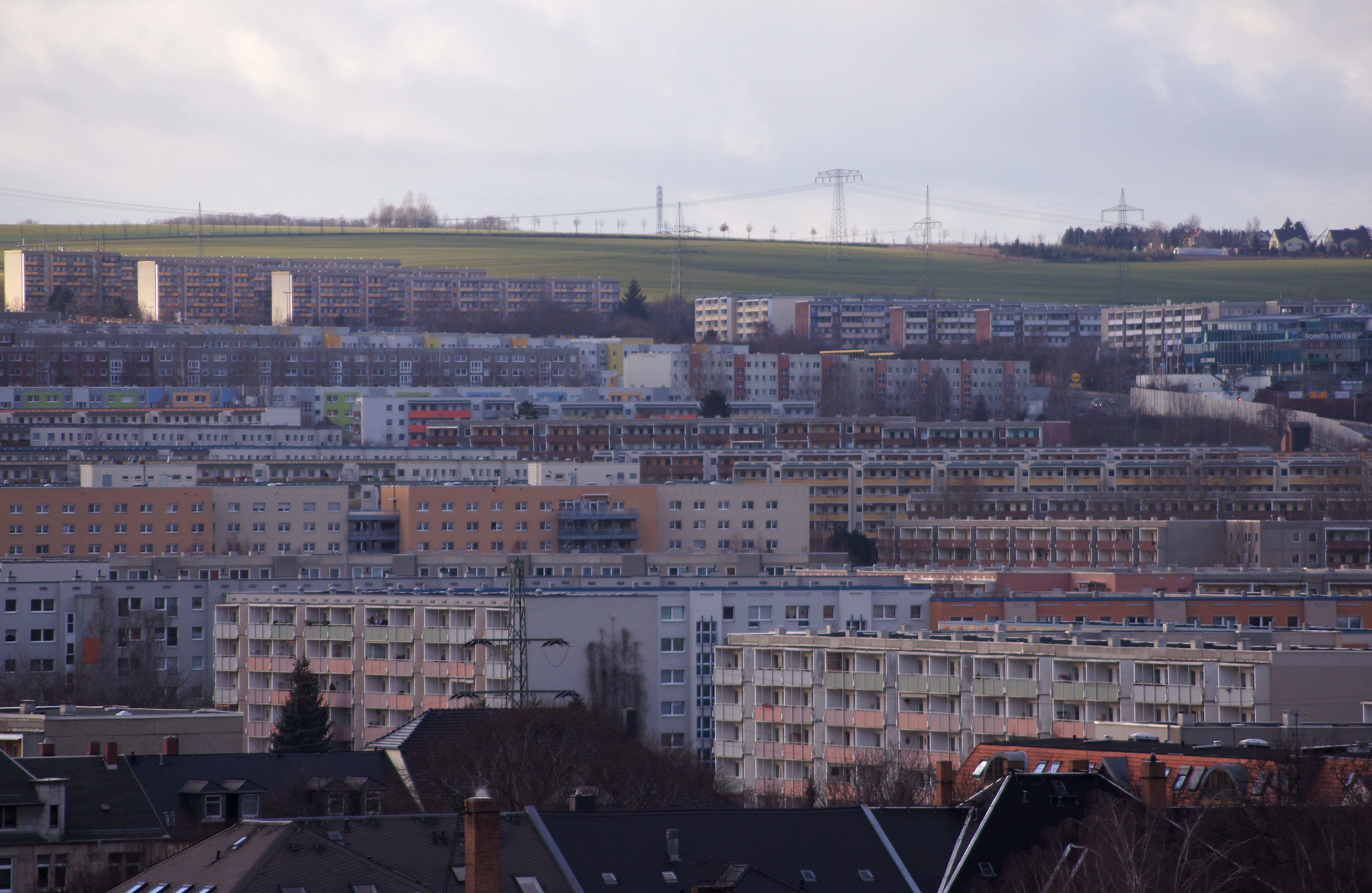 Blick auf Gorbitz von der Friedenskirche Löbtau